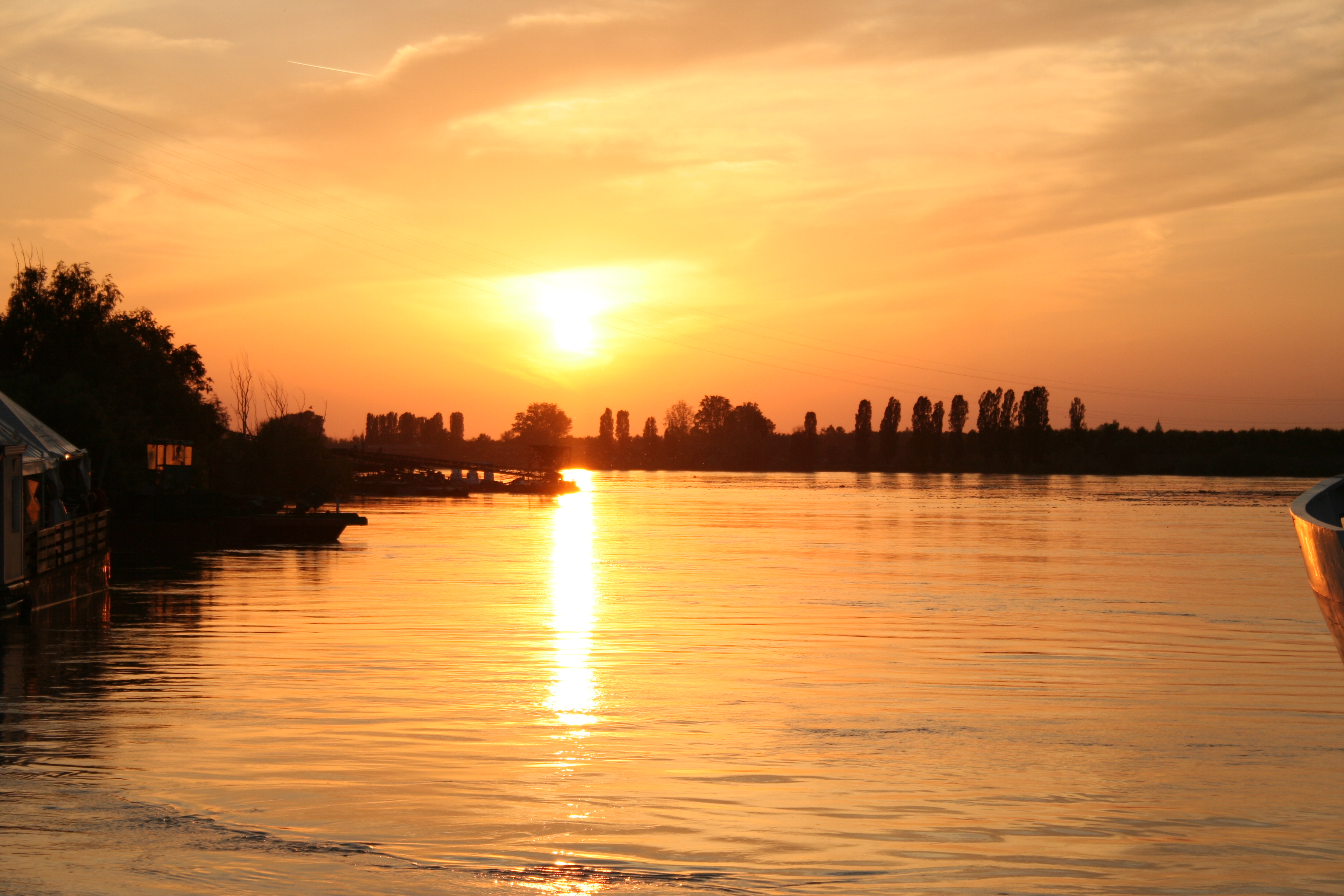 Immagine del fiume Po a Boretto (RE), tramonto durante la piena del 2008